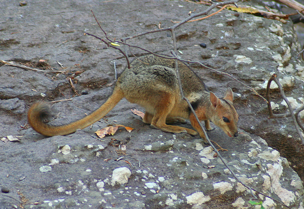 kleines känguru im kakadu np